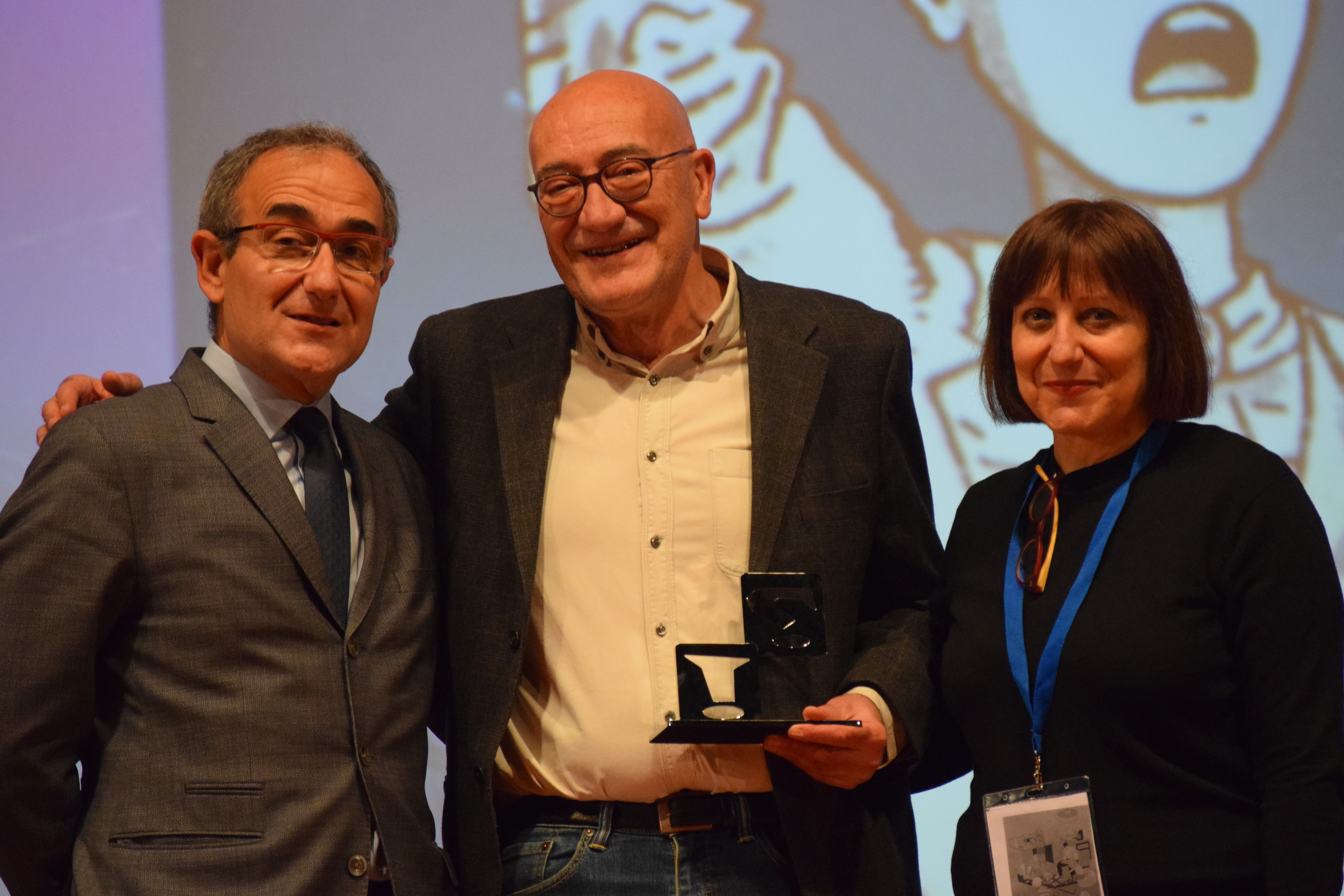 El guionista Antonio Altarriba durant la cerimònia d'entrega dels premis del 37. Còmic Barcelona. Altarriba, acompanyat de Patrici Tixis i Laura Pérez Bernetti, acaba de ser guardonat amb el Gran Premi del Saló. 37 Còmic Barcelona, 2019